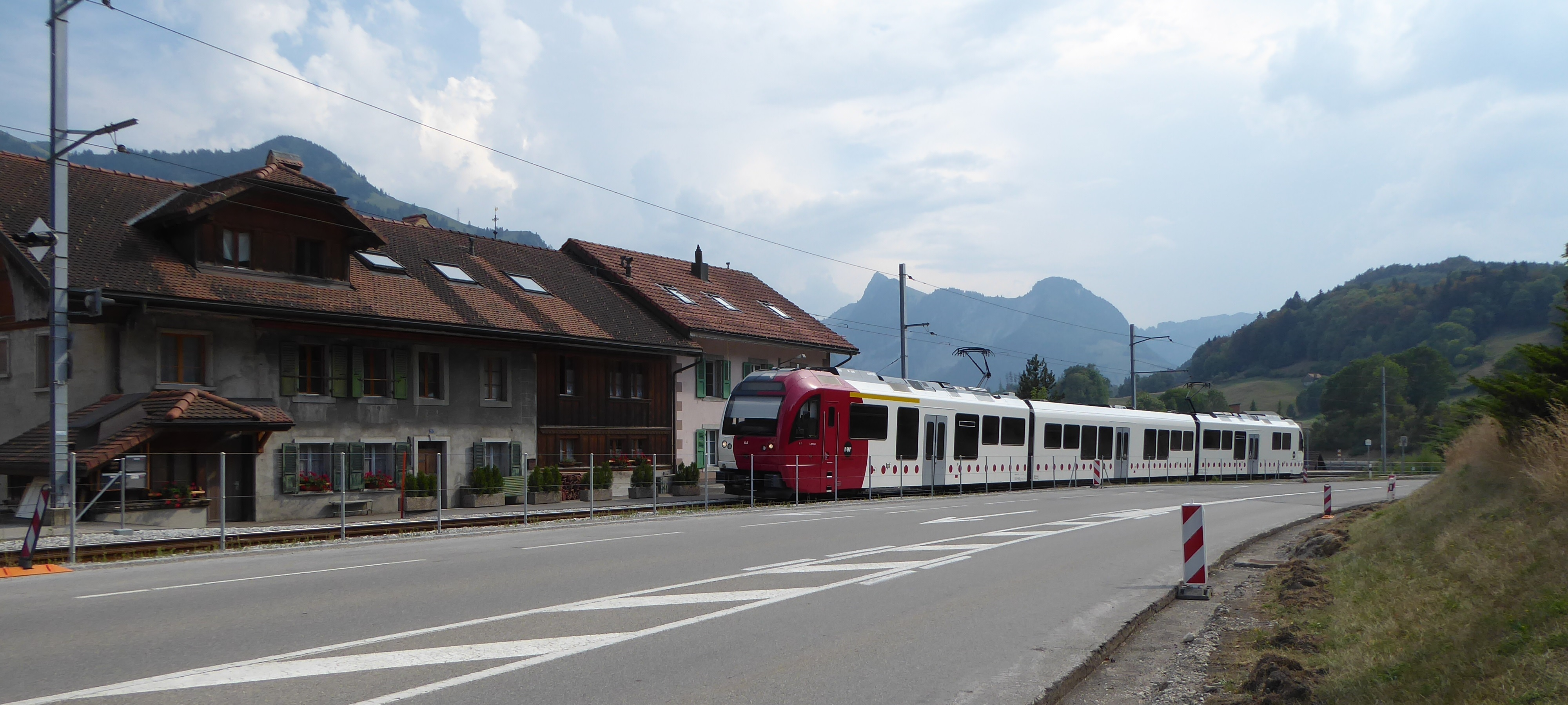 ABe 4/12 der Transports publics fribourgeois (TPF) in Albeuve